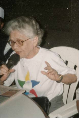 Radialista e Jornalista Adísia Sá.